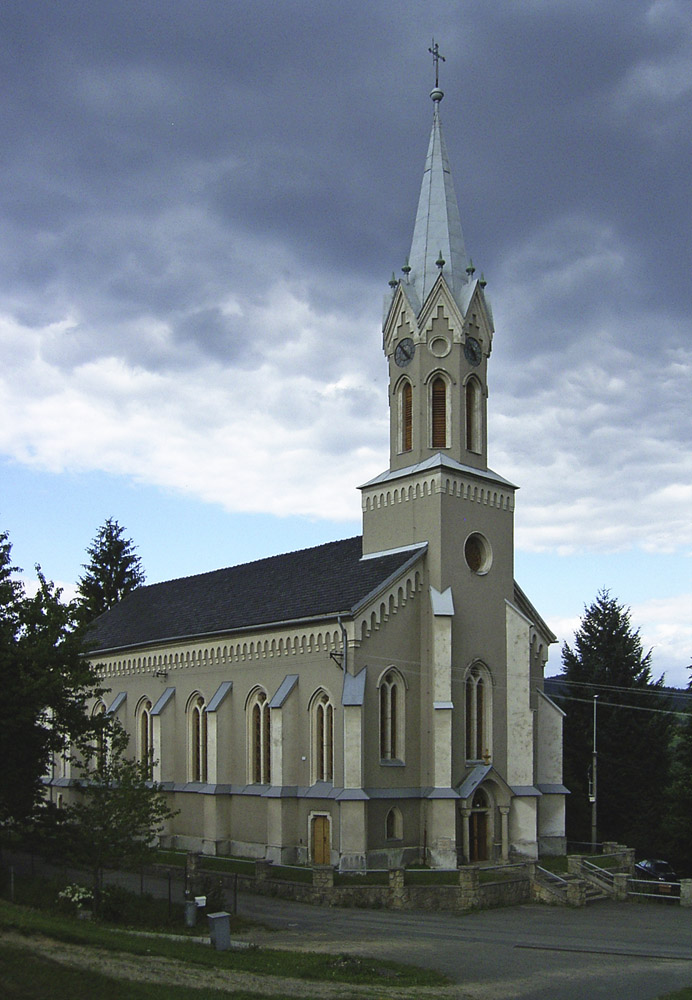 Evangelický kostel v Pržně v okrese Vsetín. Kostel byl dostaven v roce 1872.